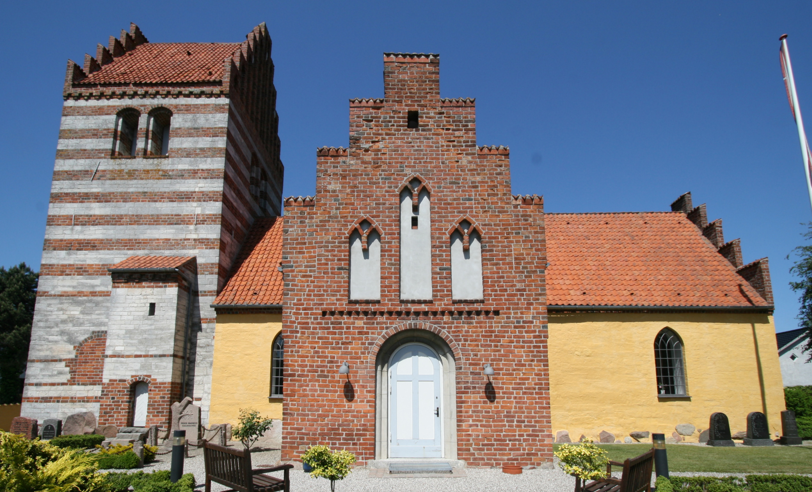 Ølsemagle Kirke, near Køge, Denmark. From south.